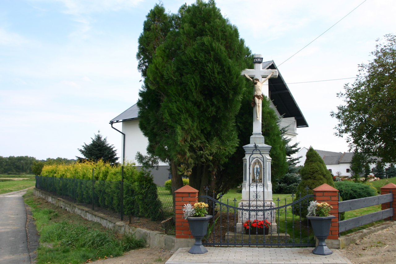 Mochów (dodatkowa nazwa w j. niem. Mochau) – wieś w Polsce położona w województwie opolskim, w powiecie prudnickim, w gminie Głogówek.